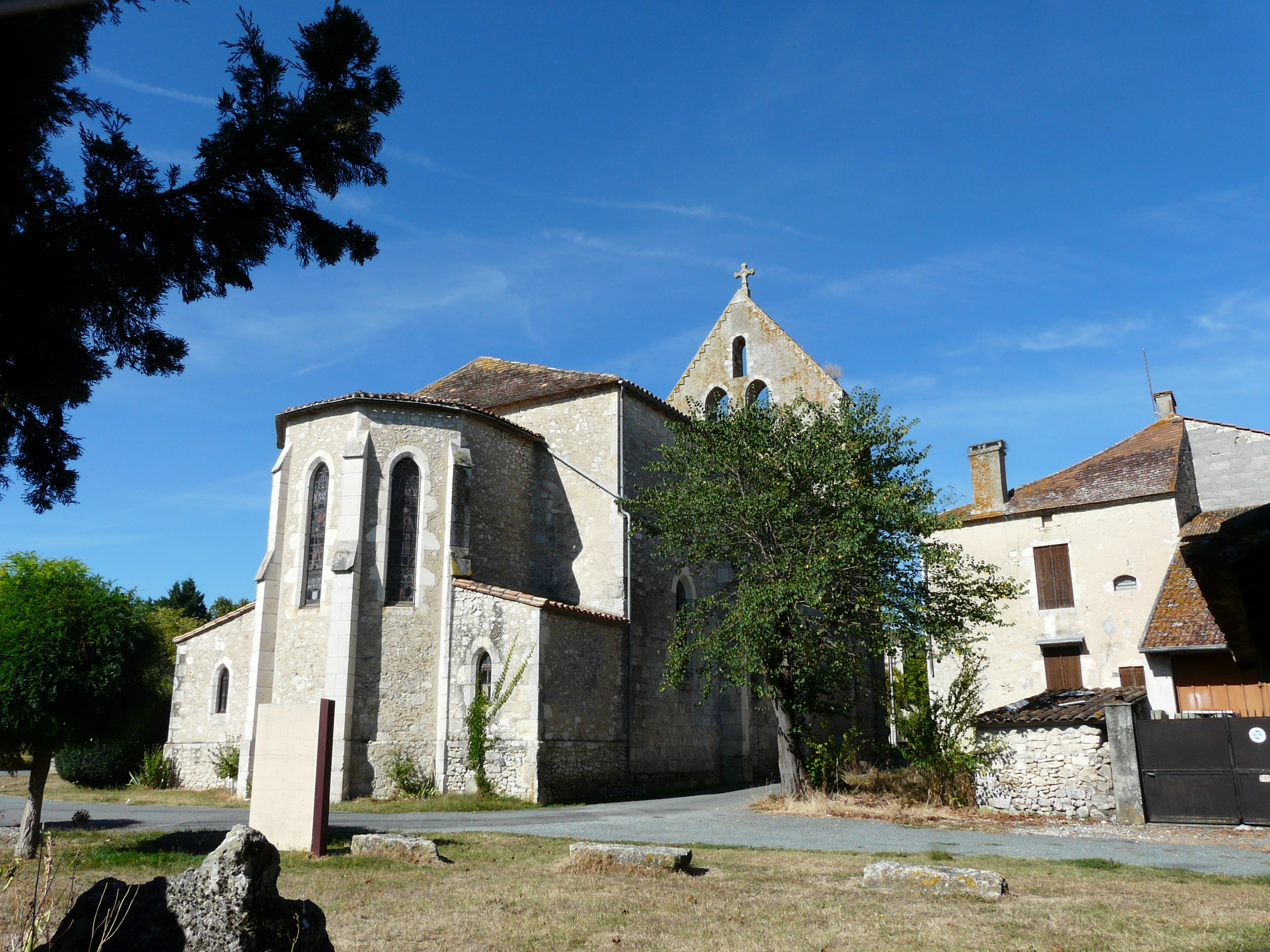 L'église Saint-Jean-Baptiste vue depuis le nord-est, Fonroque, Dordogne, France.